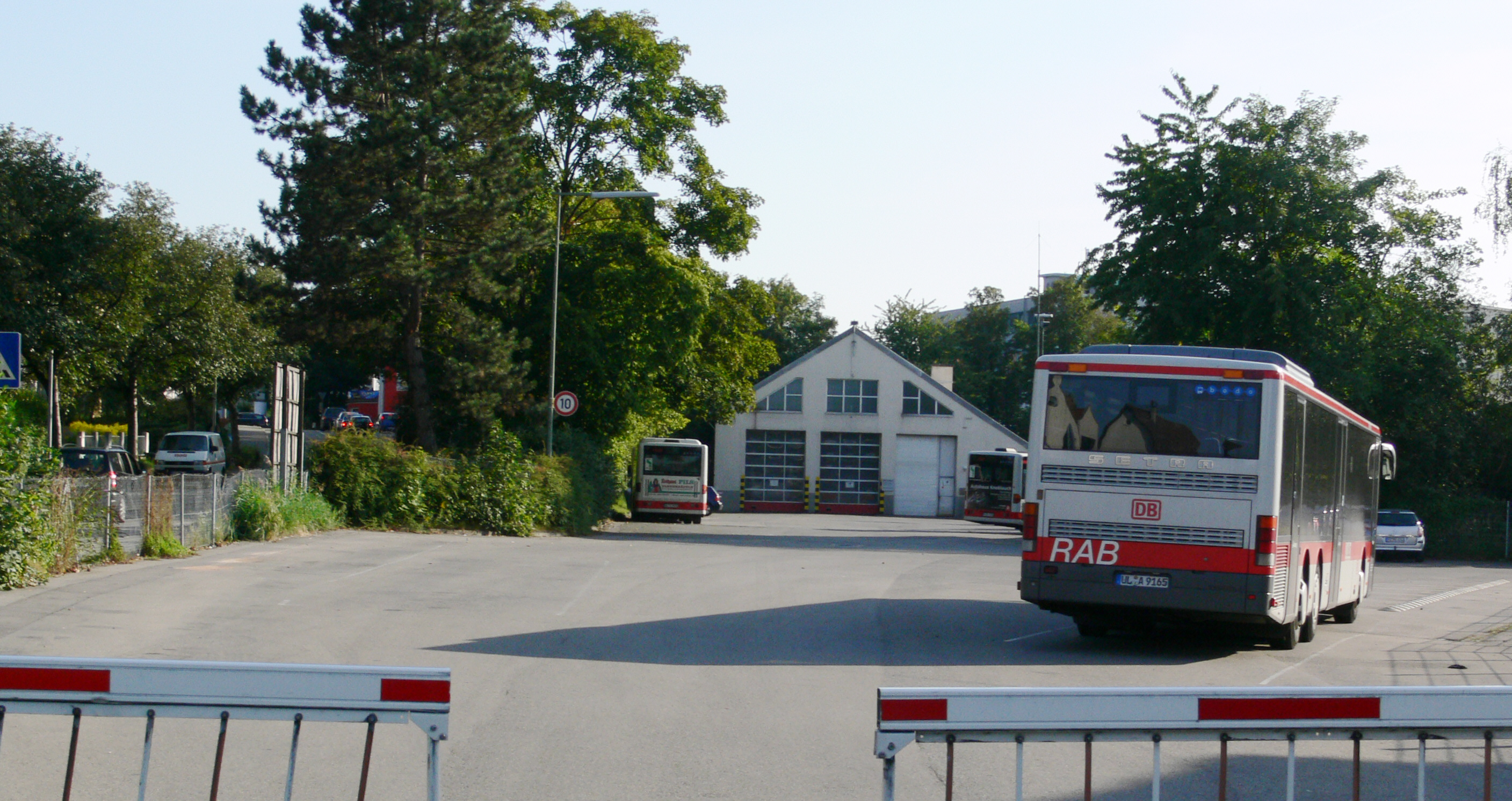 Güterbahnhof Weingarten, ehemaliges Straßenbahndepot